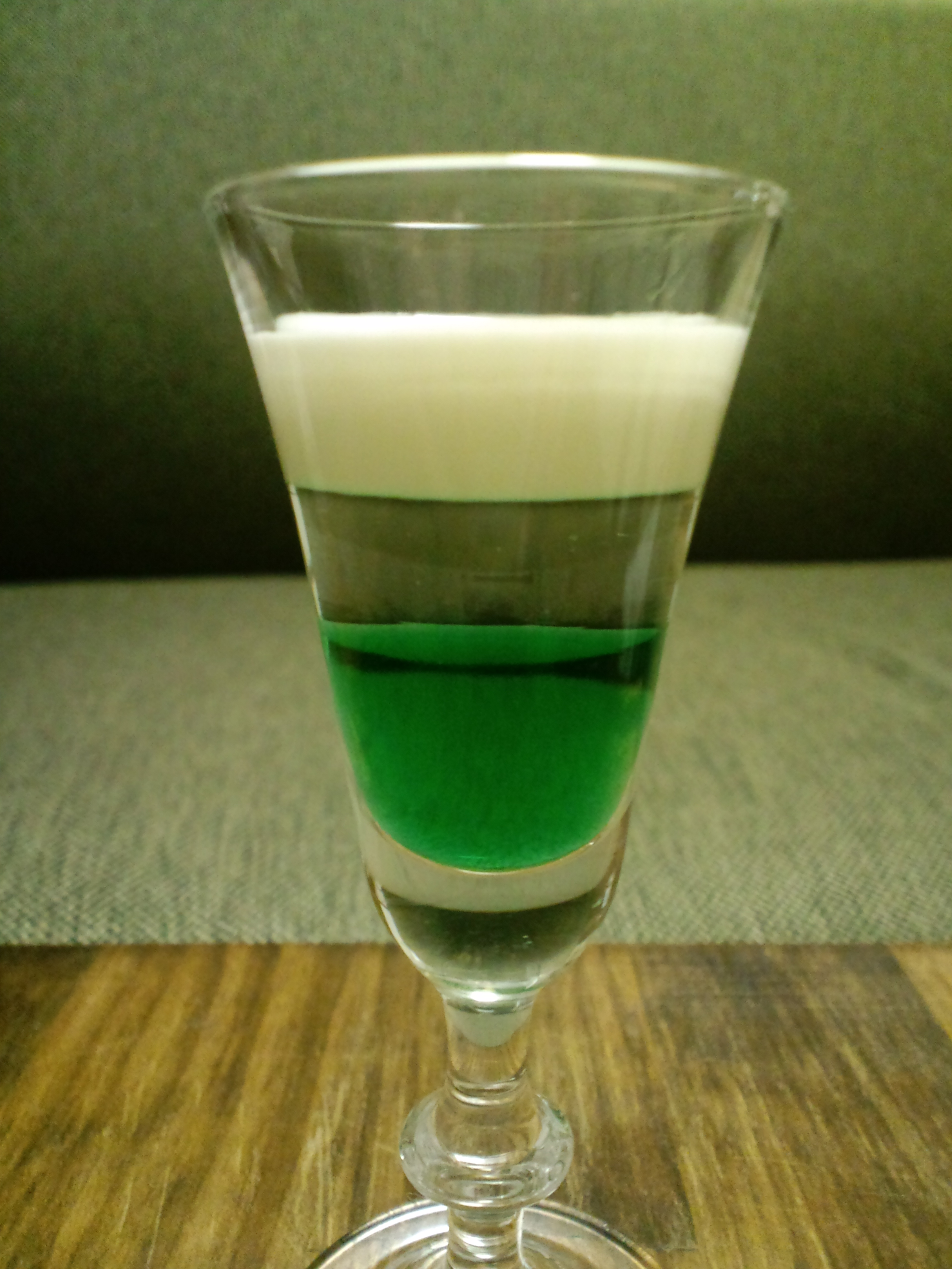 glasshopper(pousse cafe)